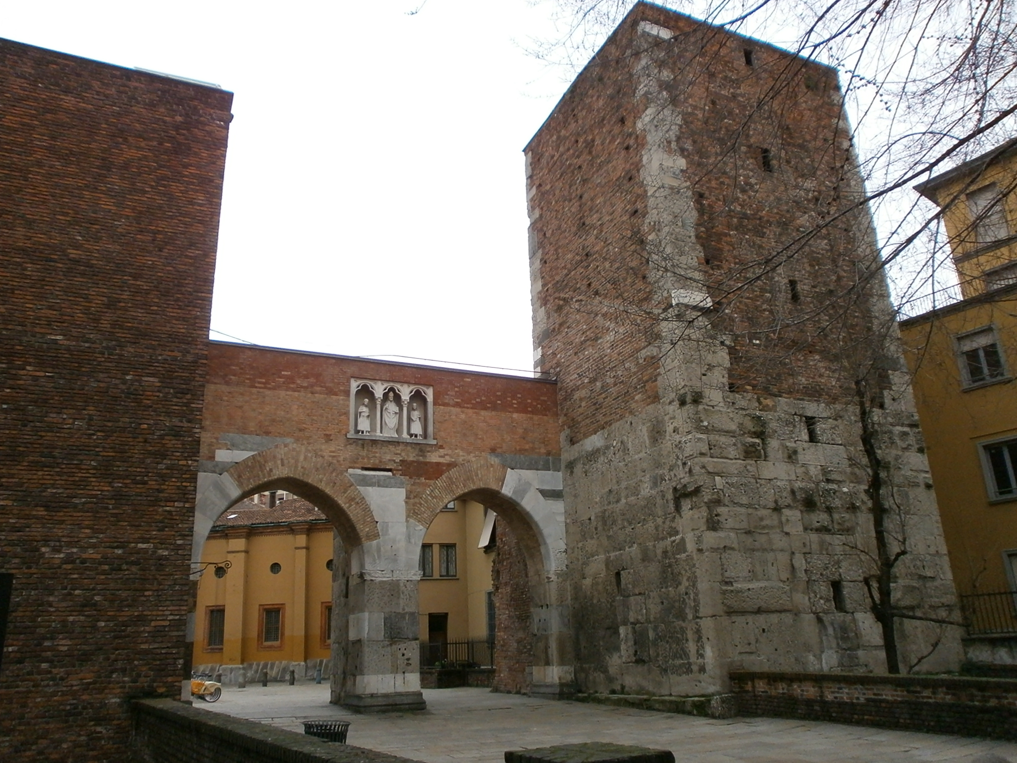 Pusterla di Sant'Ambrogio - Milan - facciata esterna